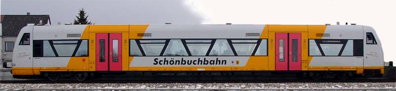 Regio-Shuttle RS1 der Schönbuchbahn am Haltepunkt Holzgerlingen-Nord